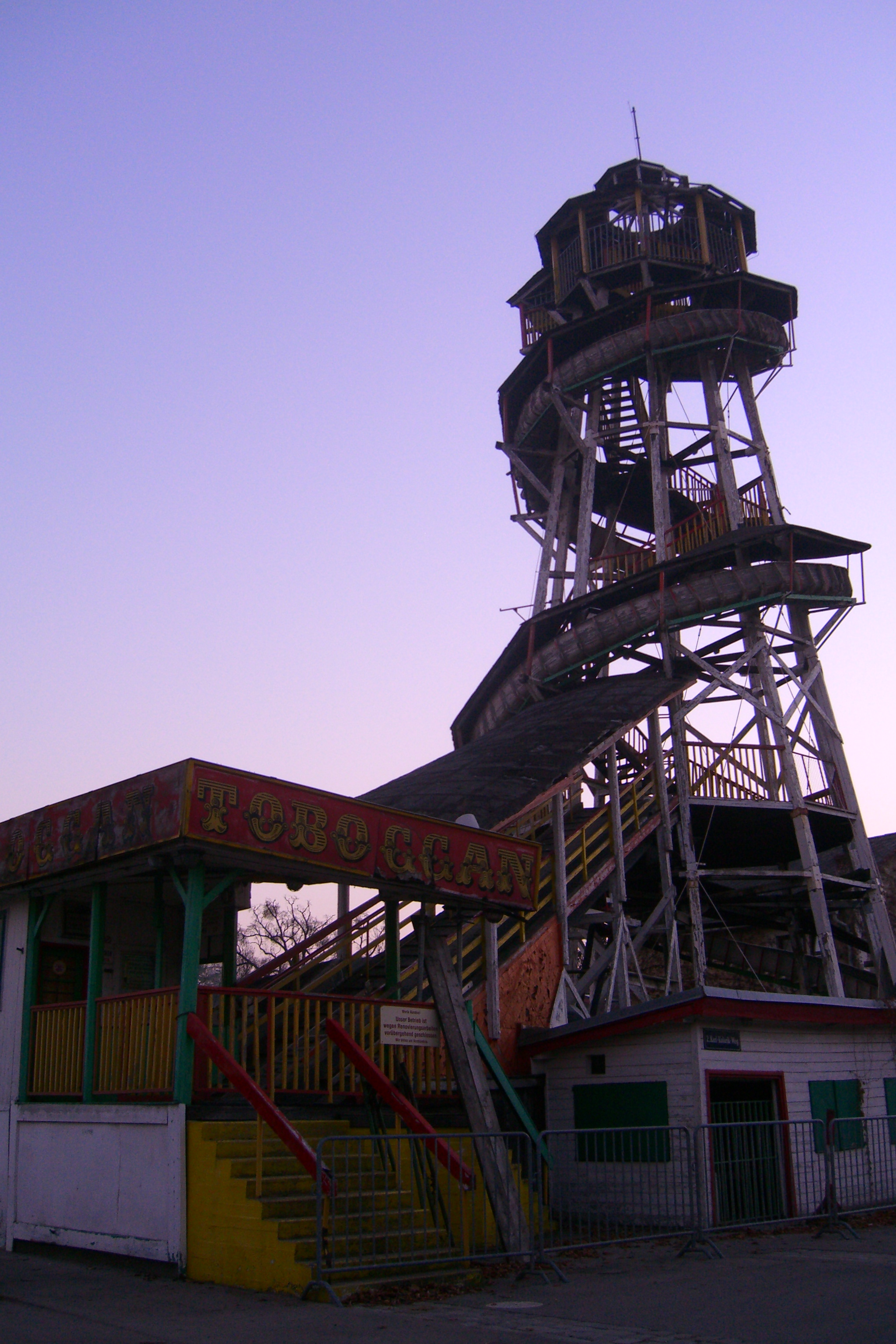 Tobogan/Wiener Prater